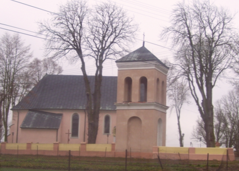 Kwiatkowice - kościół parafialny p.w. św. Mikołaja (zabytek nr rejestr. 238/34 z 24.07.1967)